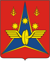 Герб города Котласа, утвержден в 2007 году